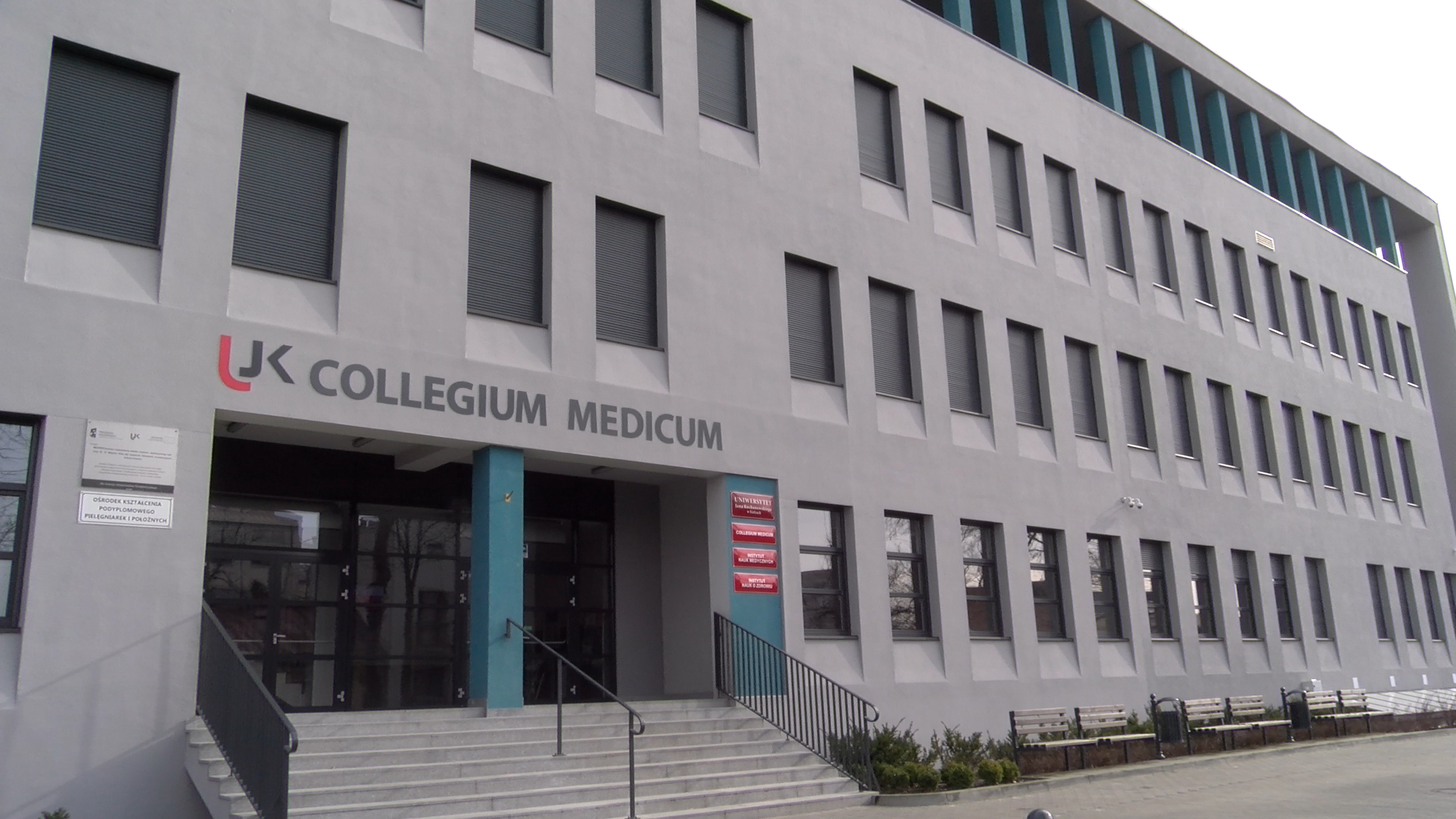 Wejście do budynku Collegium Medicum przy ul. Radiowej